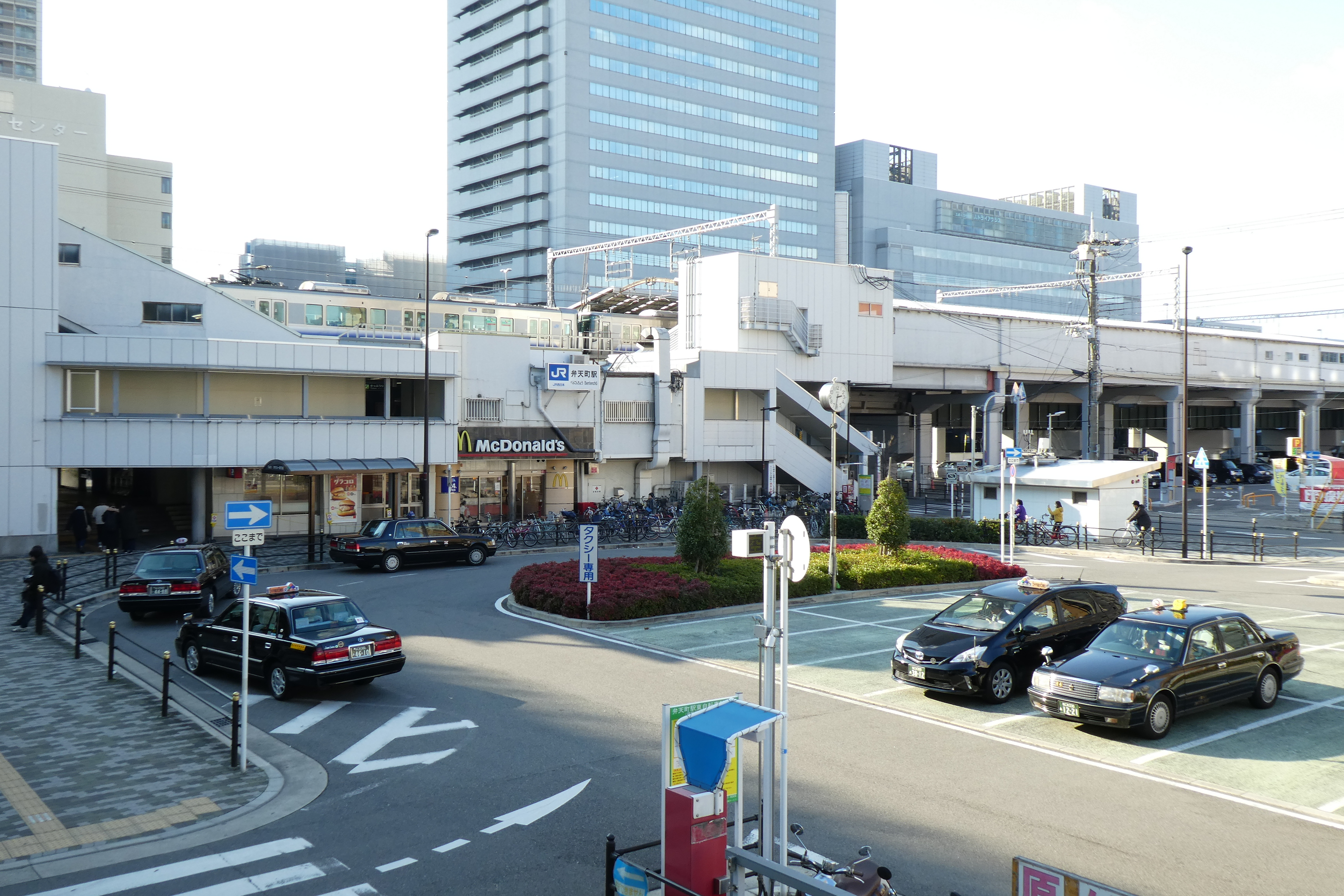 大阪環状線 弁天町駅